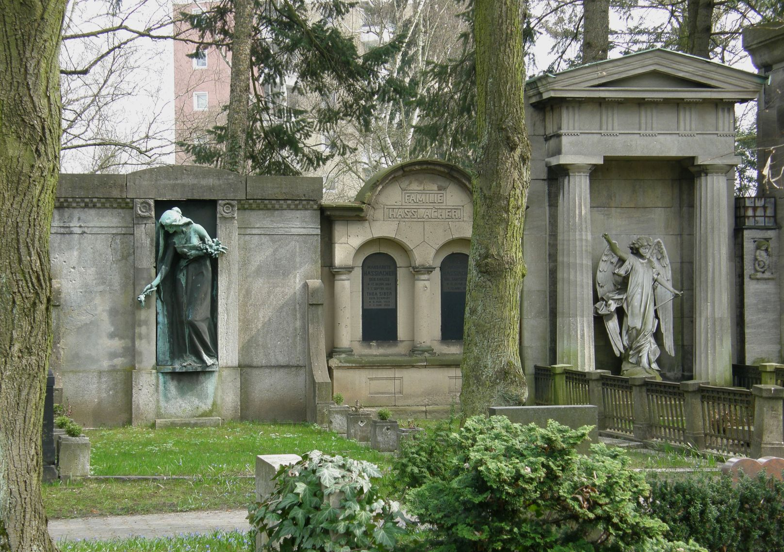 Blick auf einige Wandgräber auf dem Friedhof Wilmersdorf in Berlin